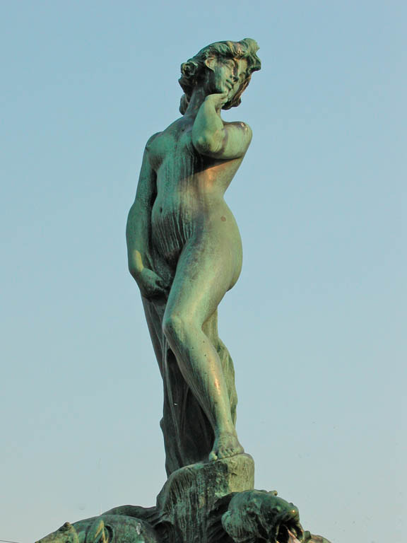 La statue "Havis Amanda" érigée en 1908 au centre d'une fontaine sur la place du vieux marché, est devenue le symbole de la ville d'Helsinki en tant que nymphe, fille de la mer. Pour satisfaire la commande de la ville, le sculpteur : Ville Vallgren (1855-1940), très célèbre à la Belle Epoque, a sculptée cette statue en France où il travaillait. Une polémique s'est développée au moment de l'inauguration de la fontaine en 1908, en raison de la nudité jugée scandaleuse de cette représentation féminine.